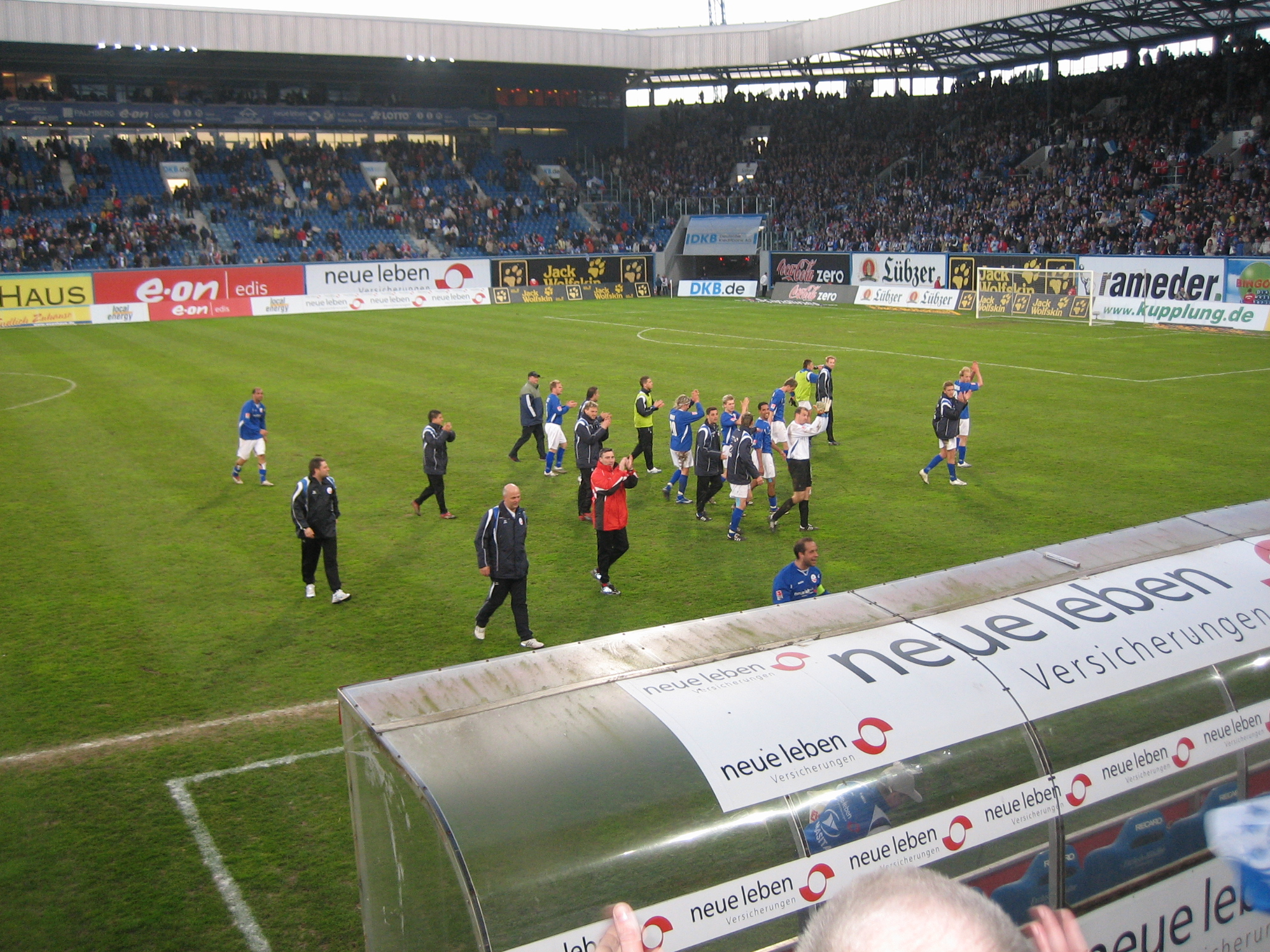 Zweitligaspiel FC Hansa Rostock vs. SC Paderborn vom 5. April 2007. Hansa gewann das Spiel mit 2:0. Hier bedanken sich die Spieler des FC Hansa bei der Fankurve.